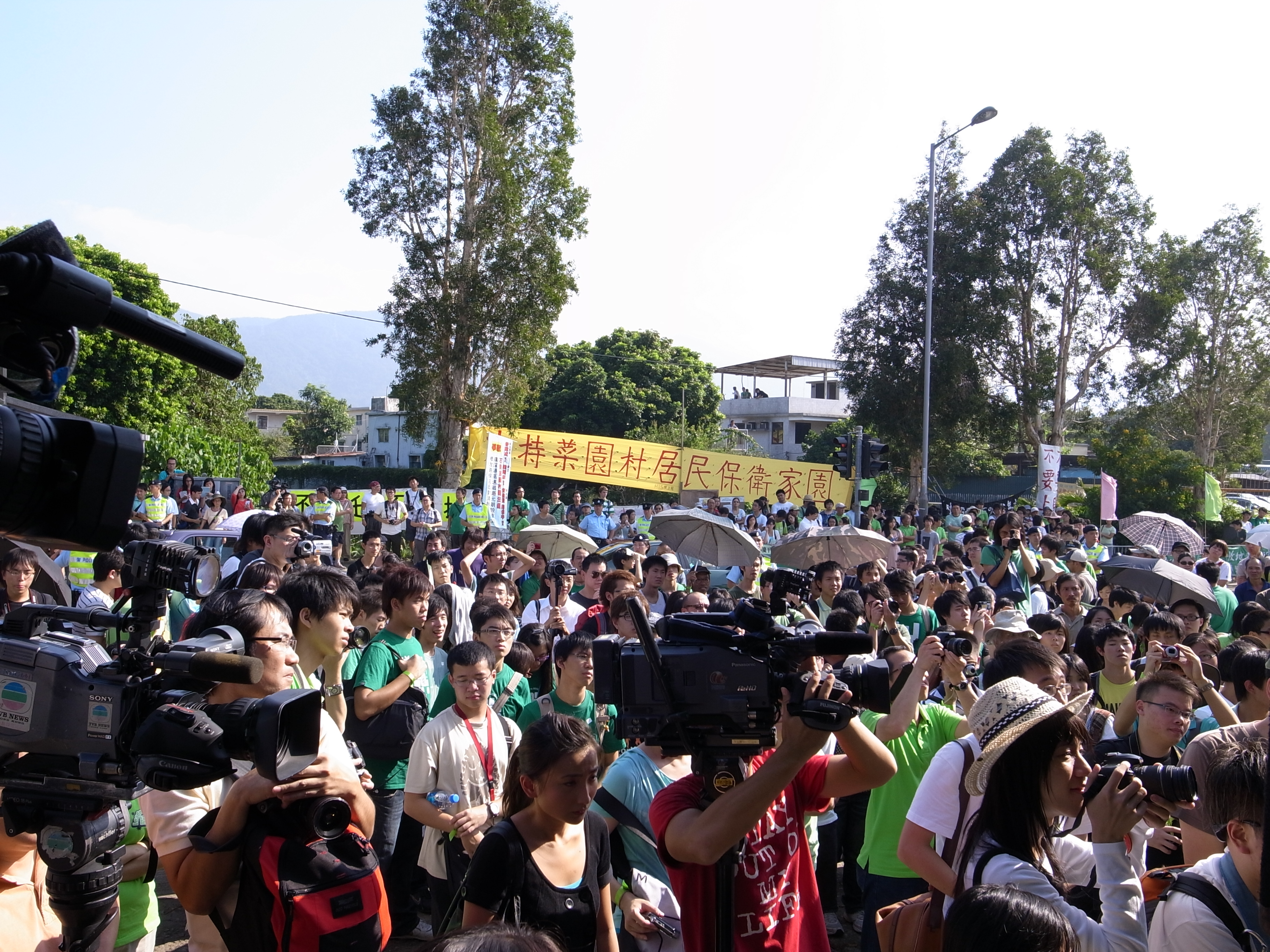 保護菜園村集會 (2009年10月18日)